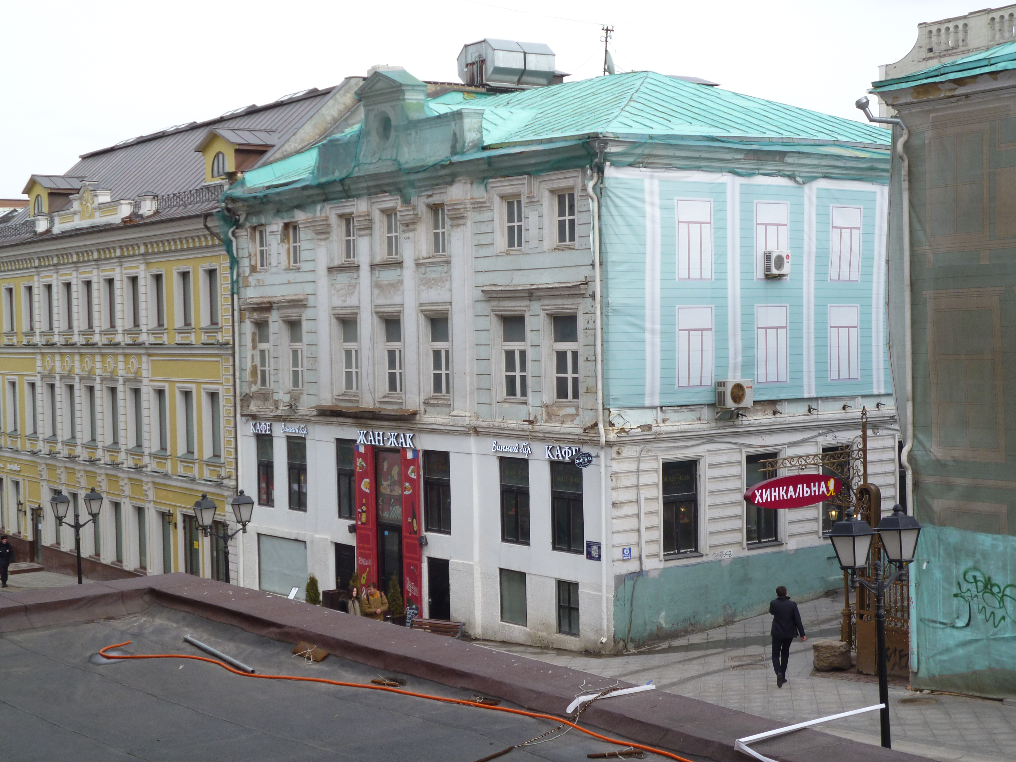 Флигель городской усадьбы Кожиных в Москве